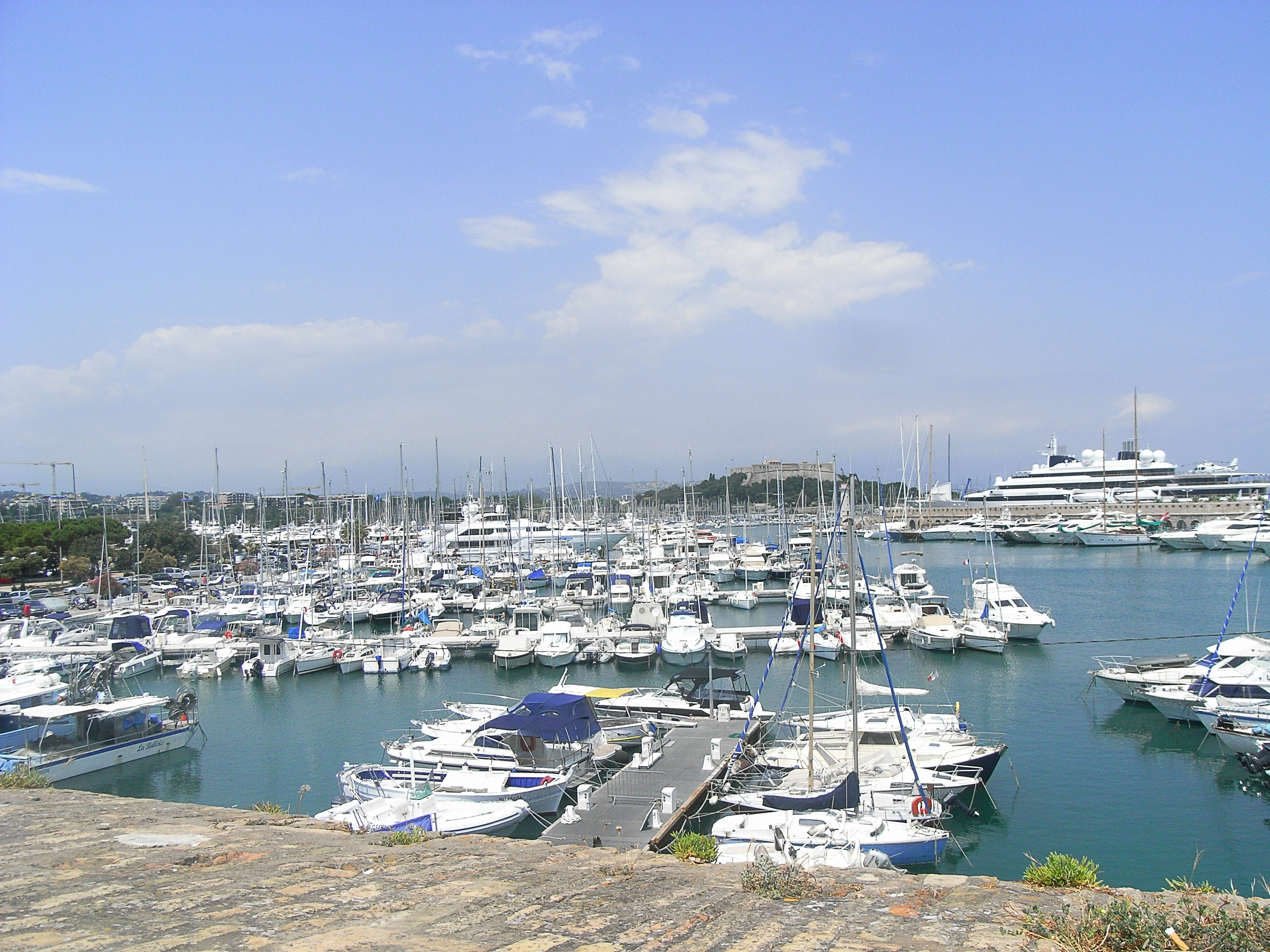 Port VAUBAN - ANTIBES